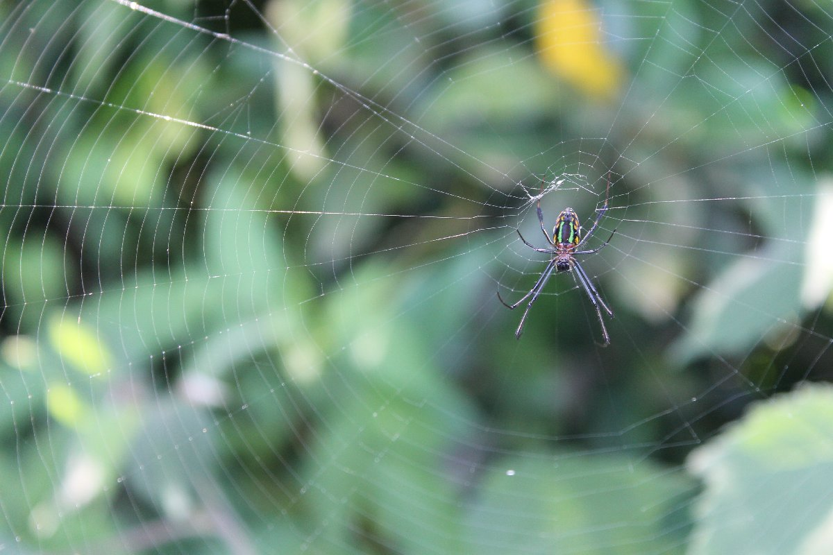 വല നെയ്ത് ഇര കാത്തിരിക്കുന്ന എട്ടുകാലി, നെല്ലിയാമ്പതി - സീതാര്‍കുണ്ടില്‍ കണ്ടത്